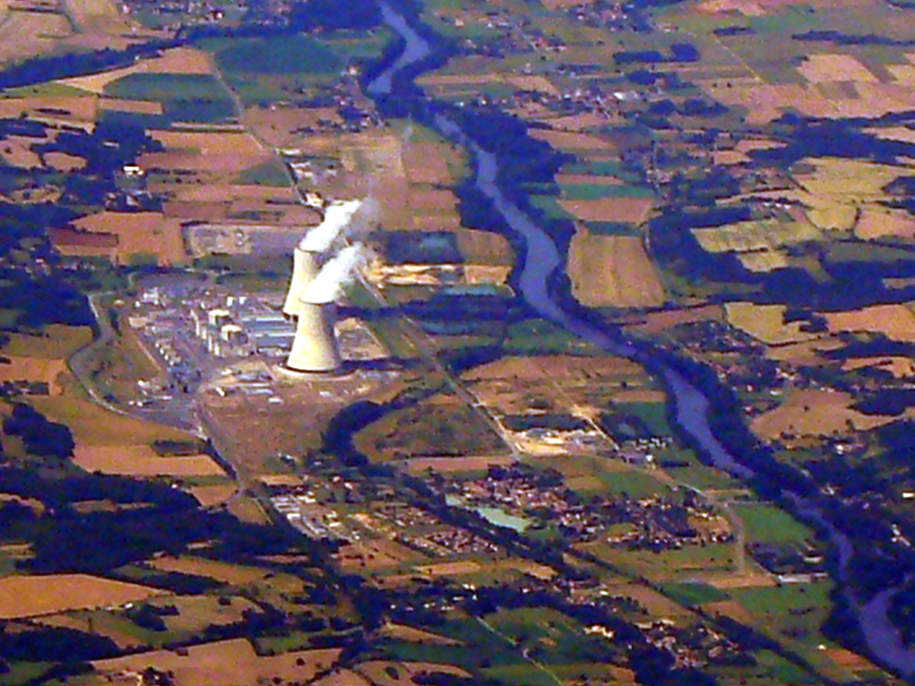 Vue aérienne de la centrale nucléaire de Civaux (Vienne, France)